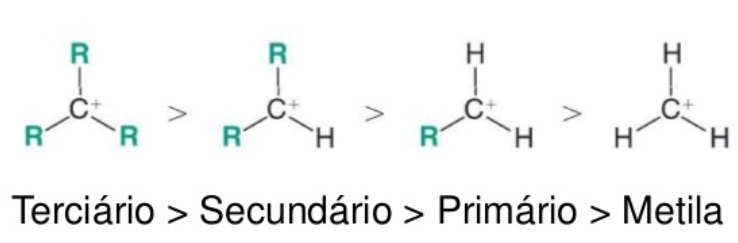 Estabilidade carbocation